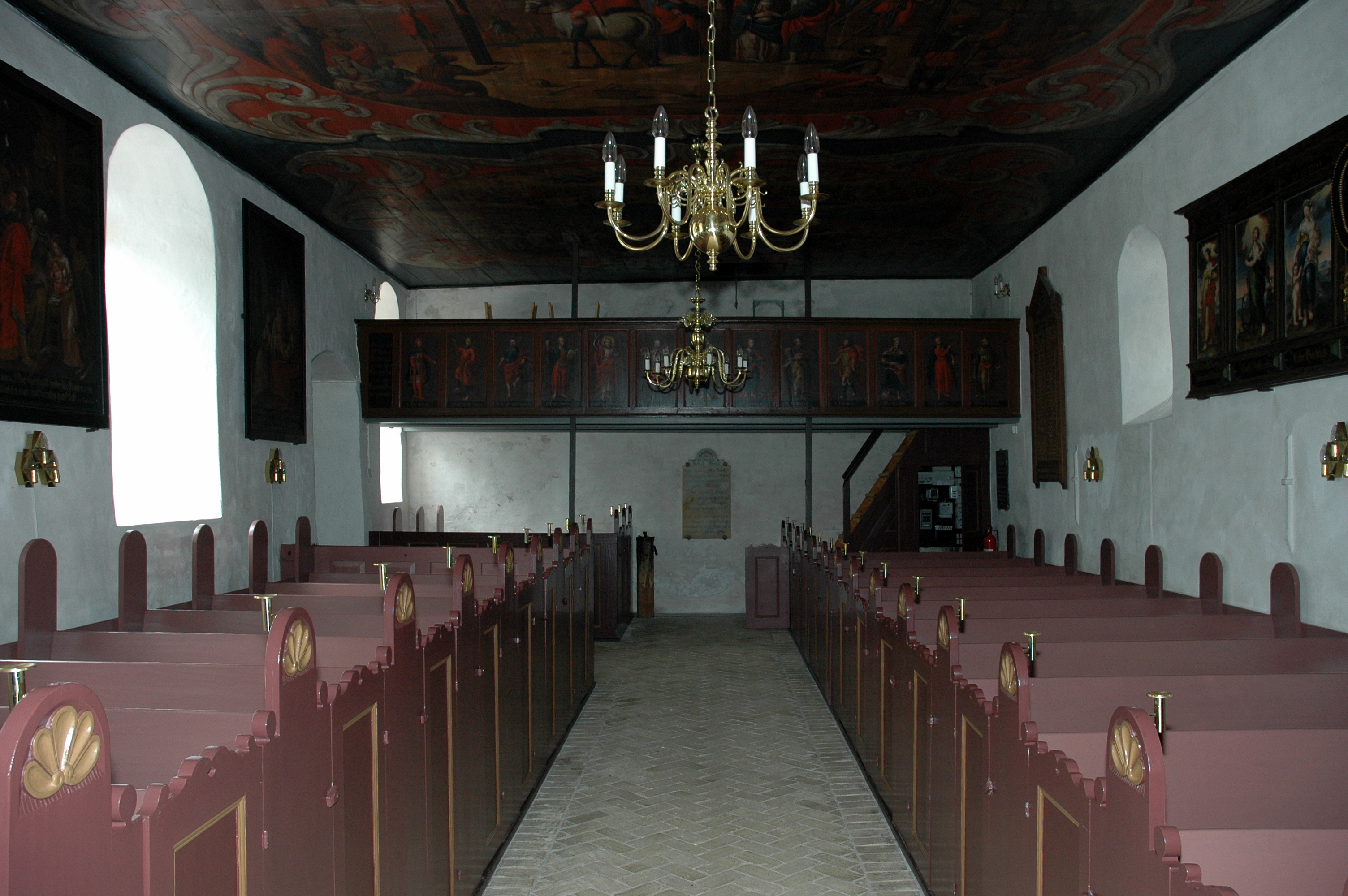 Ubjerg Kirke